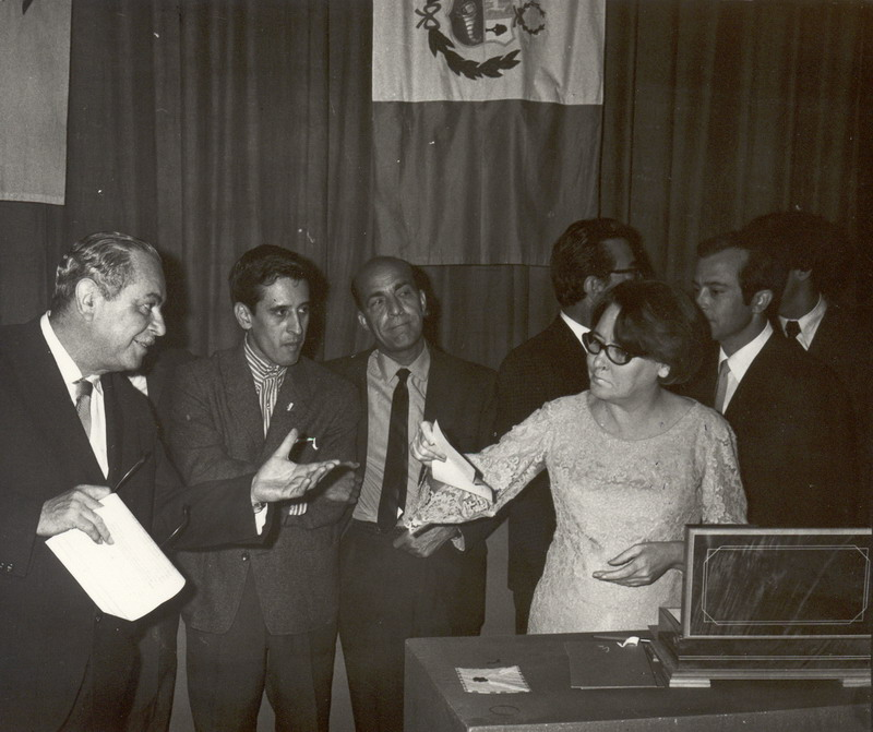 Reunión del grupo literario cubano Casa de las Américas